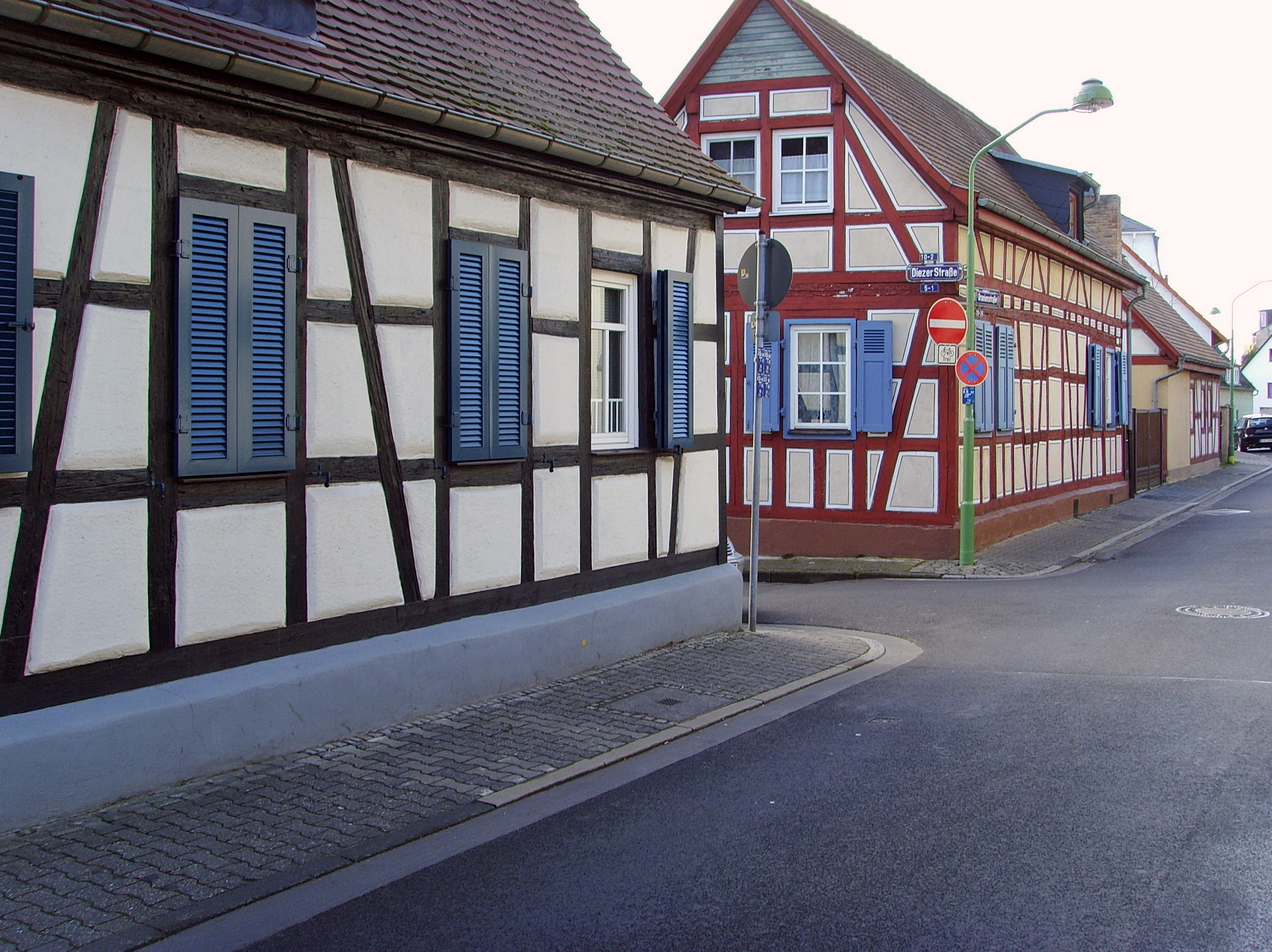 renovierte Katen im alten Ortskern von Frankfurt am Main-Heddernheim, Oranienstrasse / Ecke Diezer Strasse this photo was taken by User:Gerbil from de.Wikipedia in march 2007